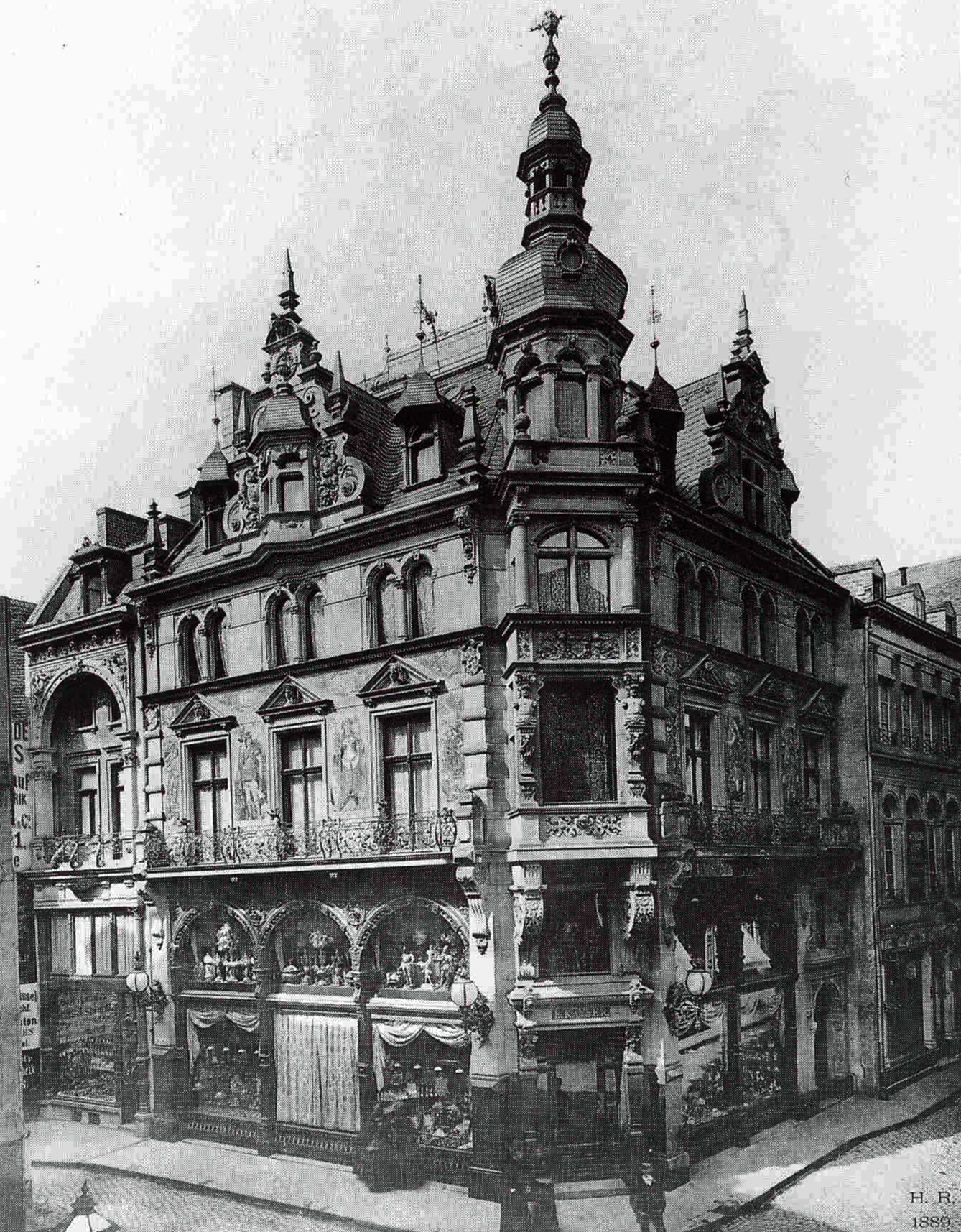 Hohe-Straße-Köln, 1889 Haus-Kayser. (Brücken- Ecke Hohe Straße)